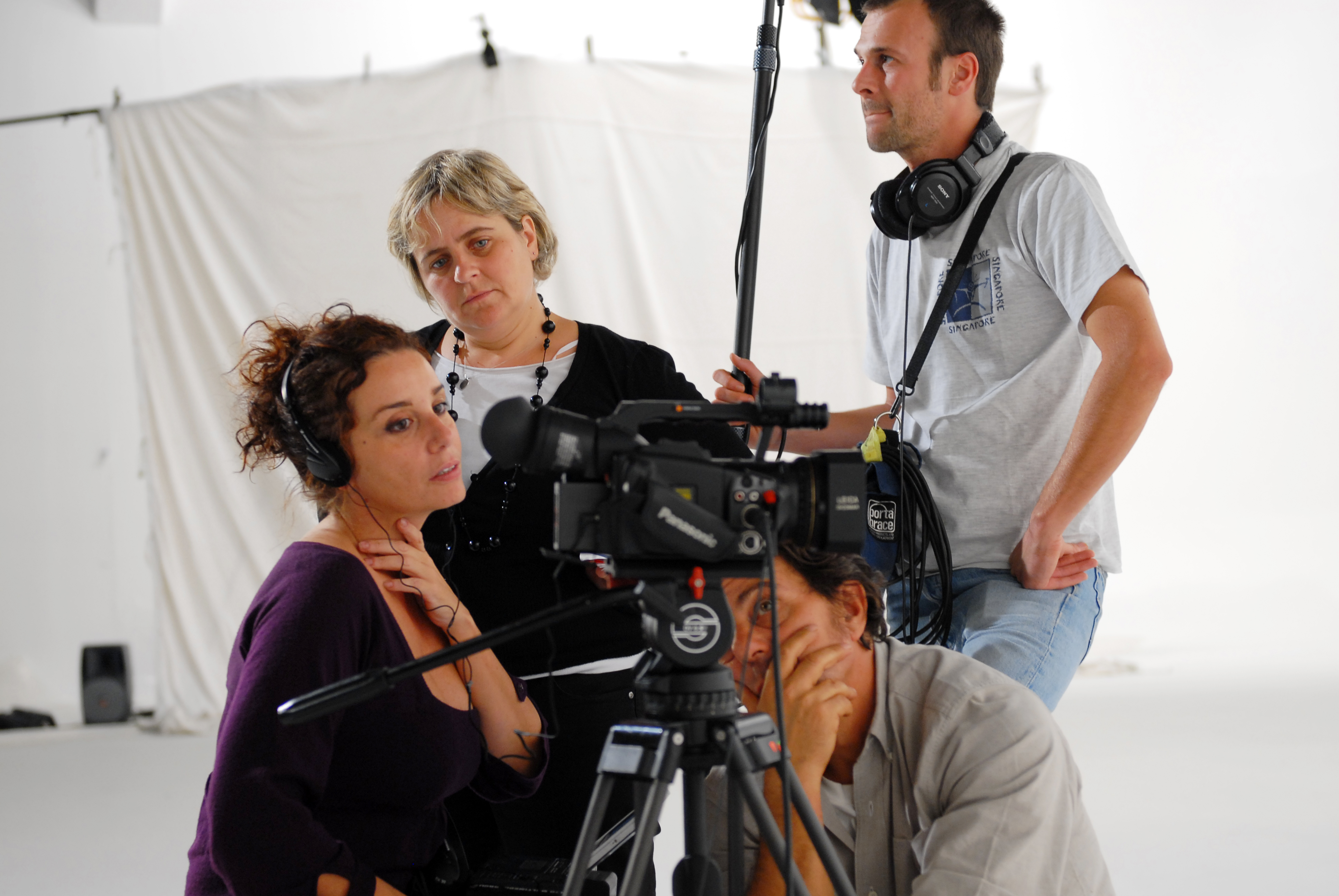 roberta torre